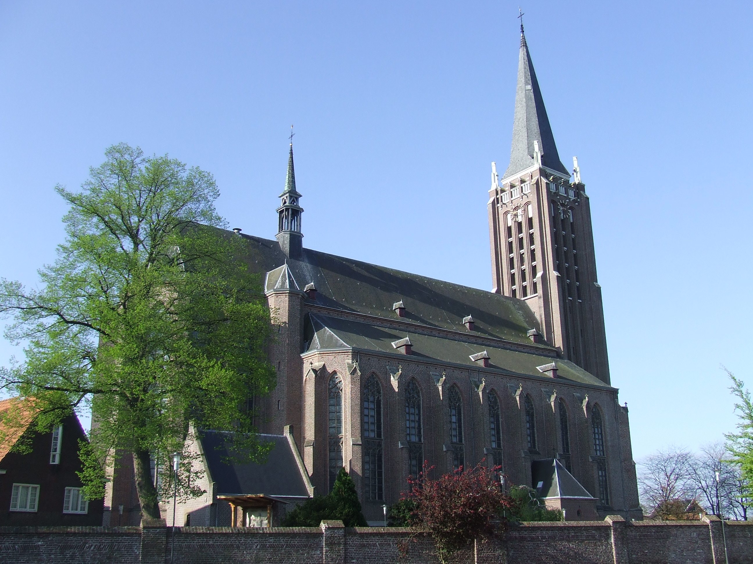 Sint Petrus' Bandenkerk Venray